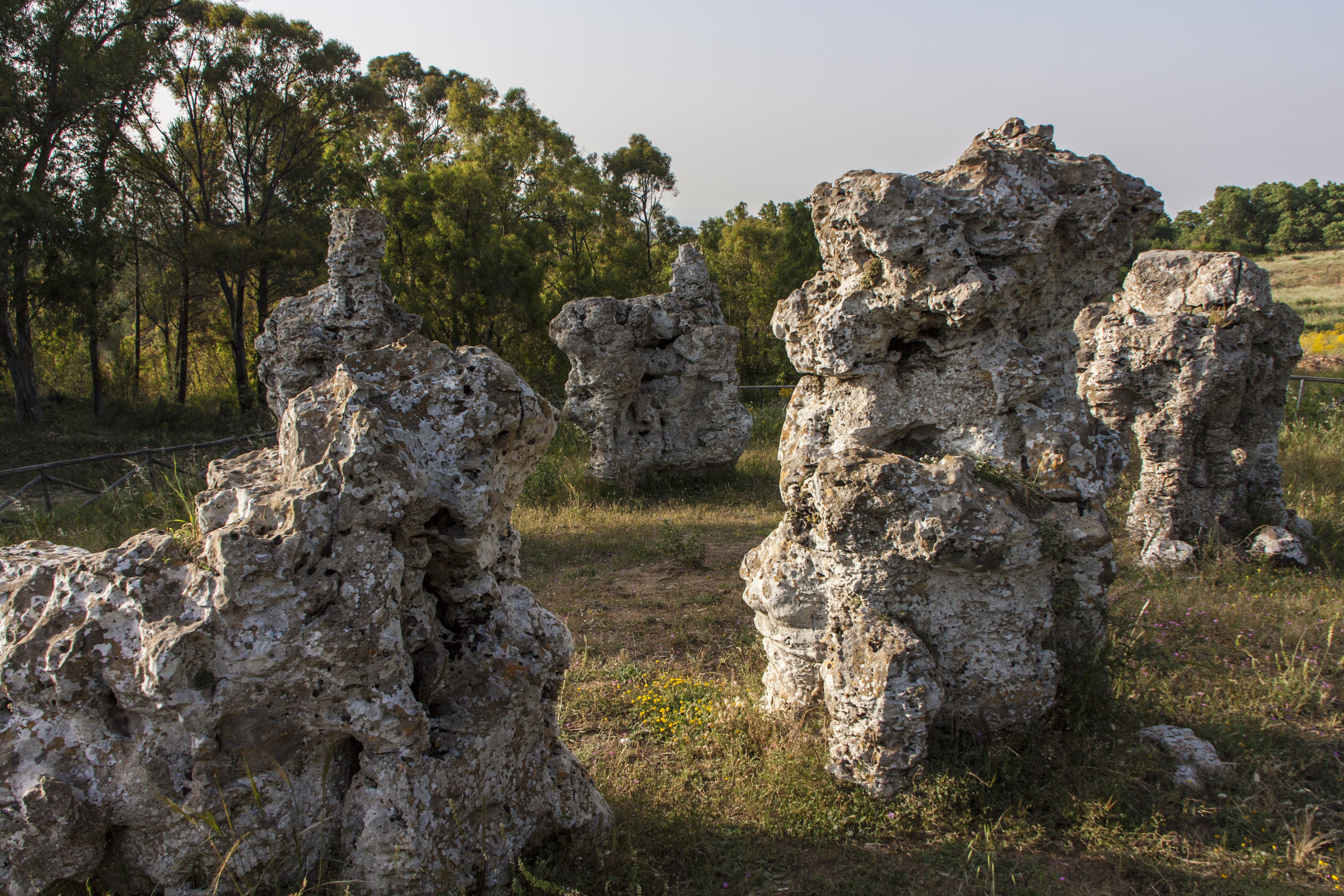 Pietre incantate